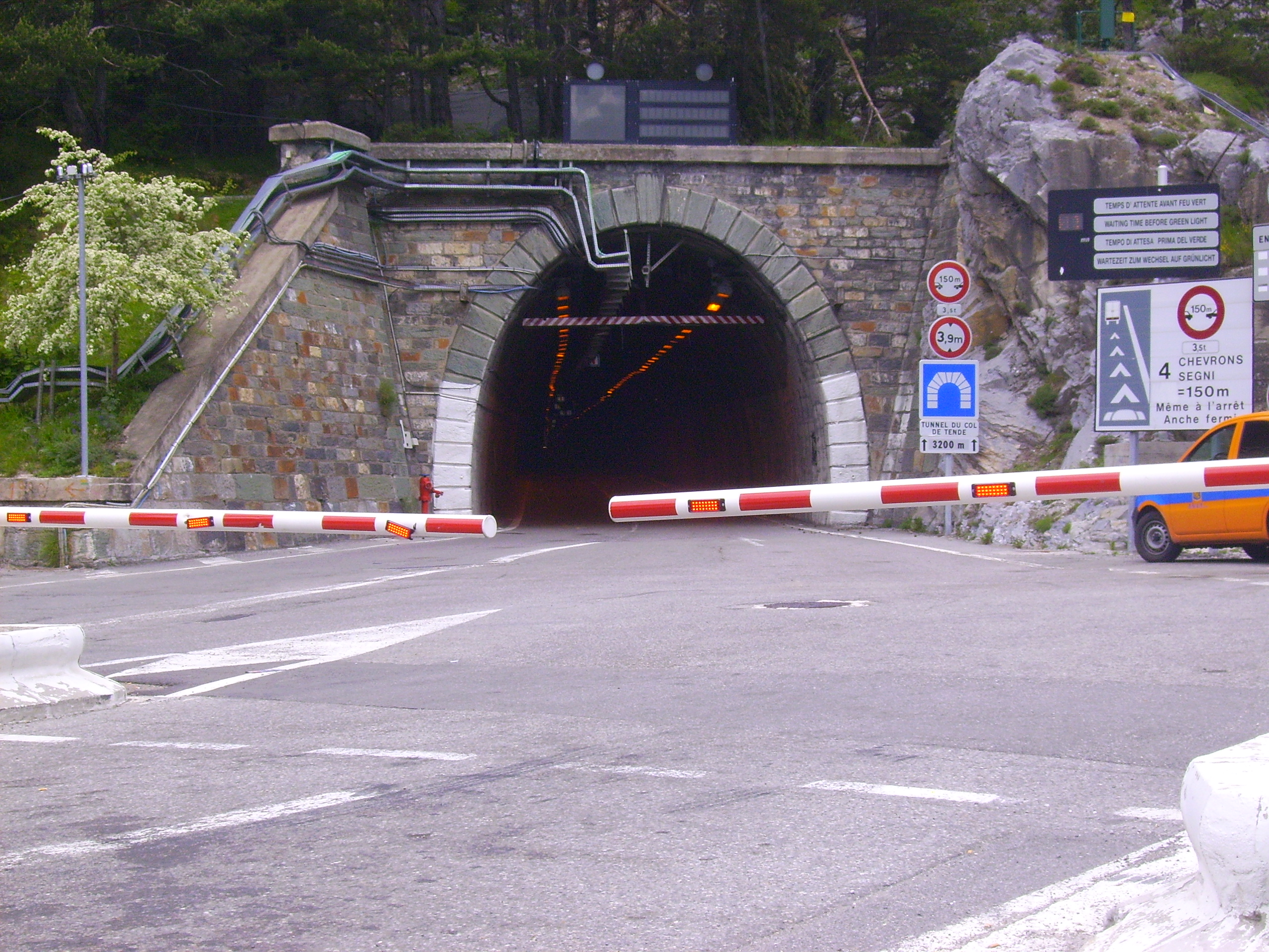 Tunnel de Tende du coté de Tende